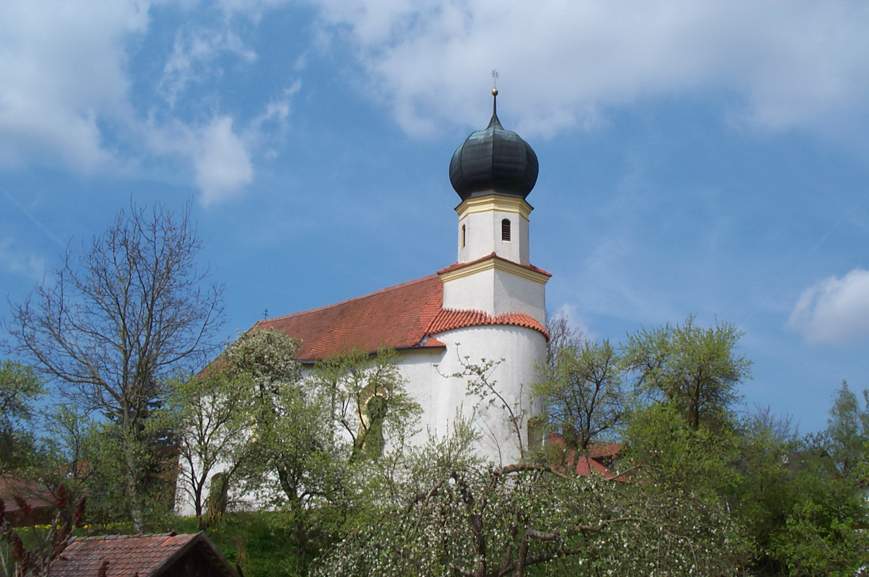 Kirche St. Nikolaus und St. Martin in Pram